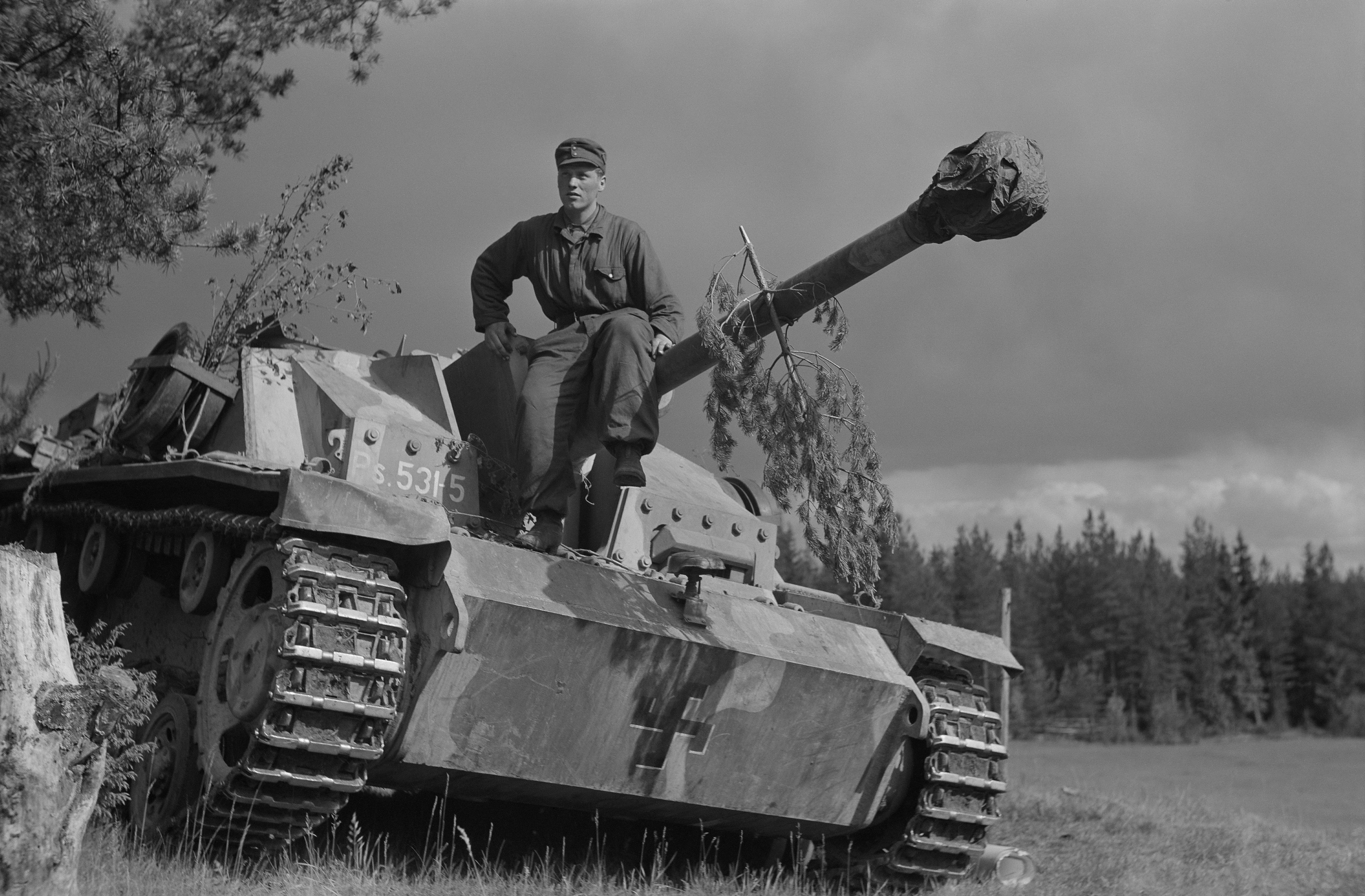 Rynnäkkötykit odottavat taistelukäskyä. Tienhaara,Hanhijoki 1944.06.23